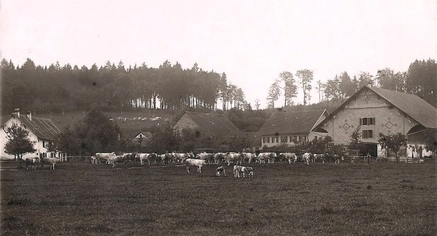 Kundelfingerhof um 1916 mit Grossviehherde vor und Jungviehherde hinter den Hofgebäuden